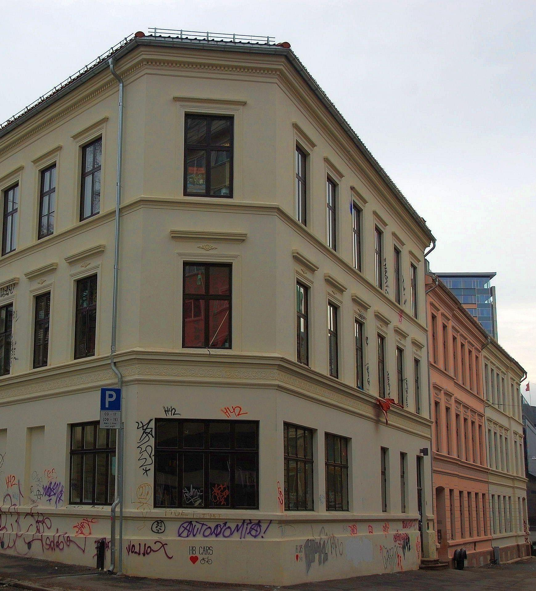 Blitzhuset i Oslo 25.mars 2010